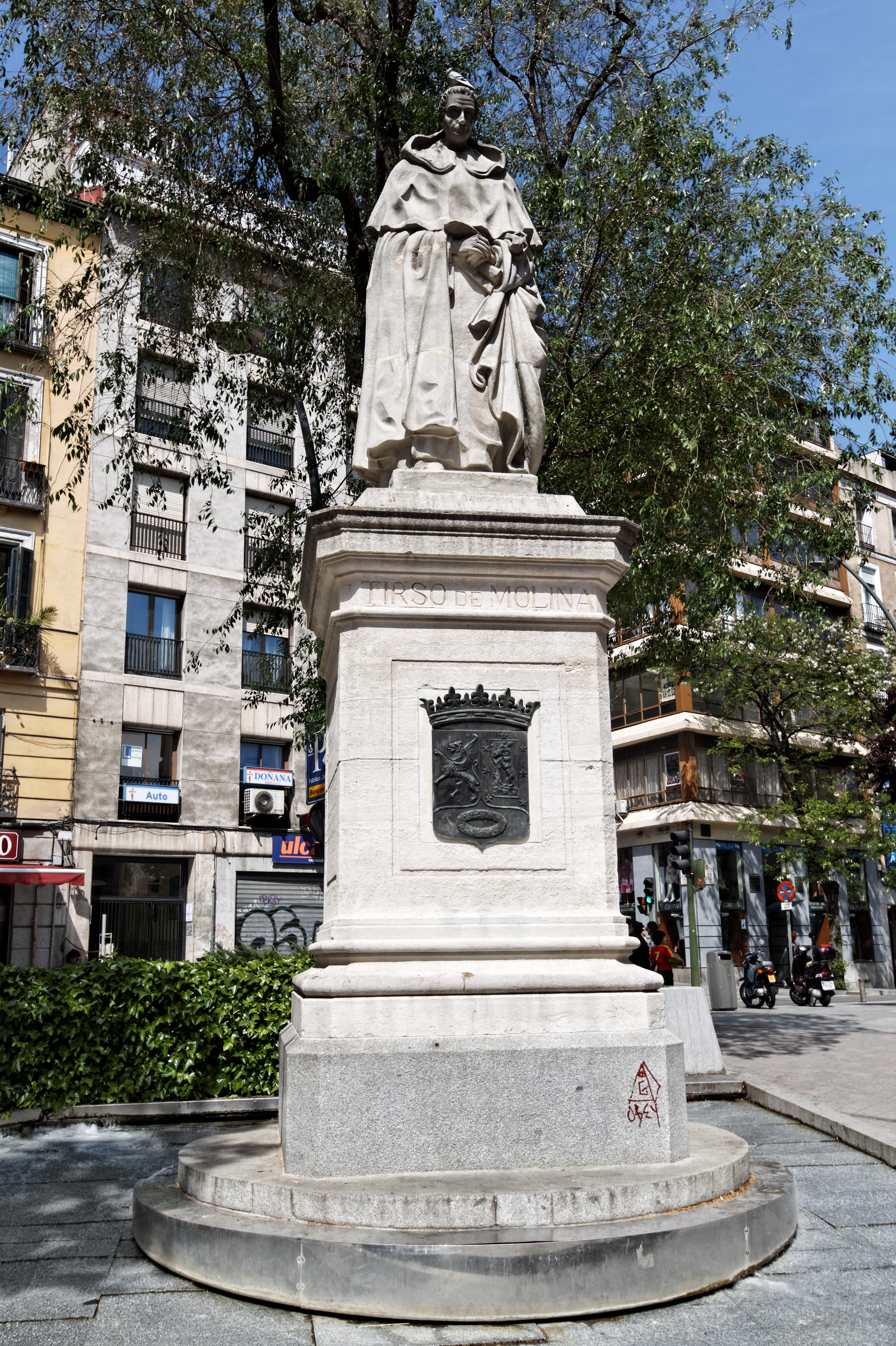 Monumento a Tirso de Molina, ubicado en la plaza Tirso de Molina, Madrid.